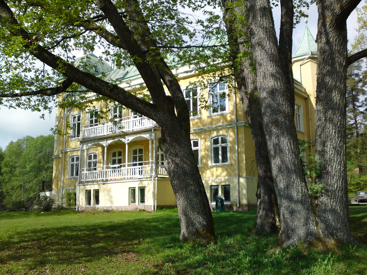 I Forshaga...